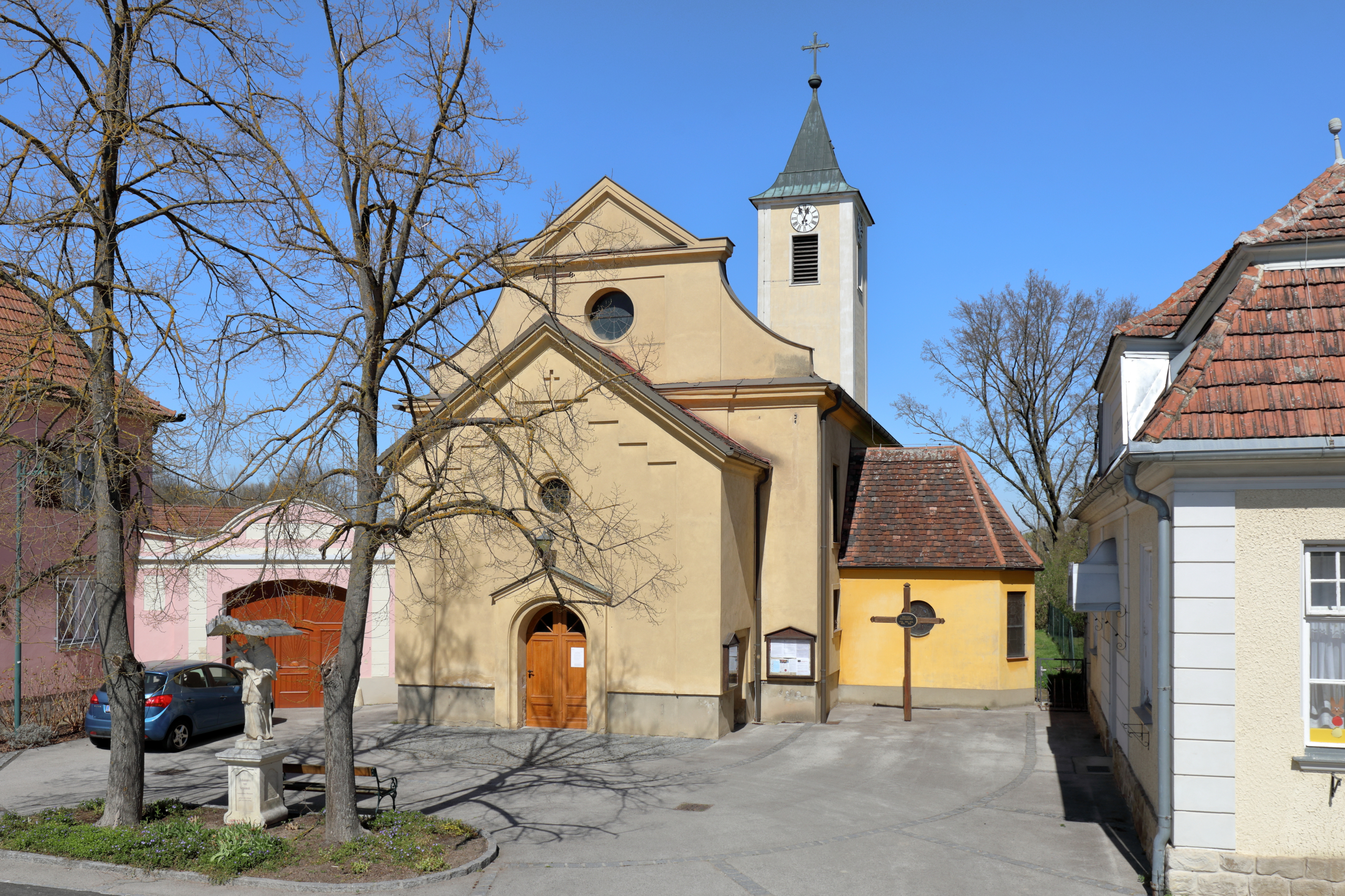 Südansicht der röm.-kath. Pfarrkirche hl. Andreas in Altenwörth, ein Ortsteil der niederösterreichischen Marktgemeinde Kirchberg am Wagram.